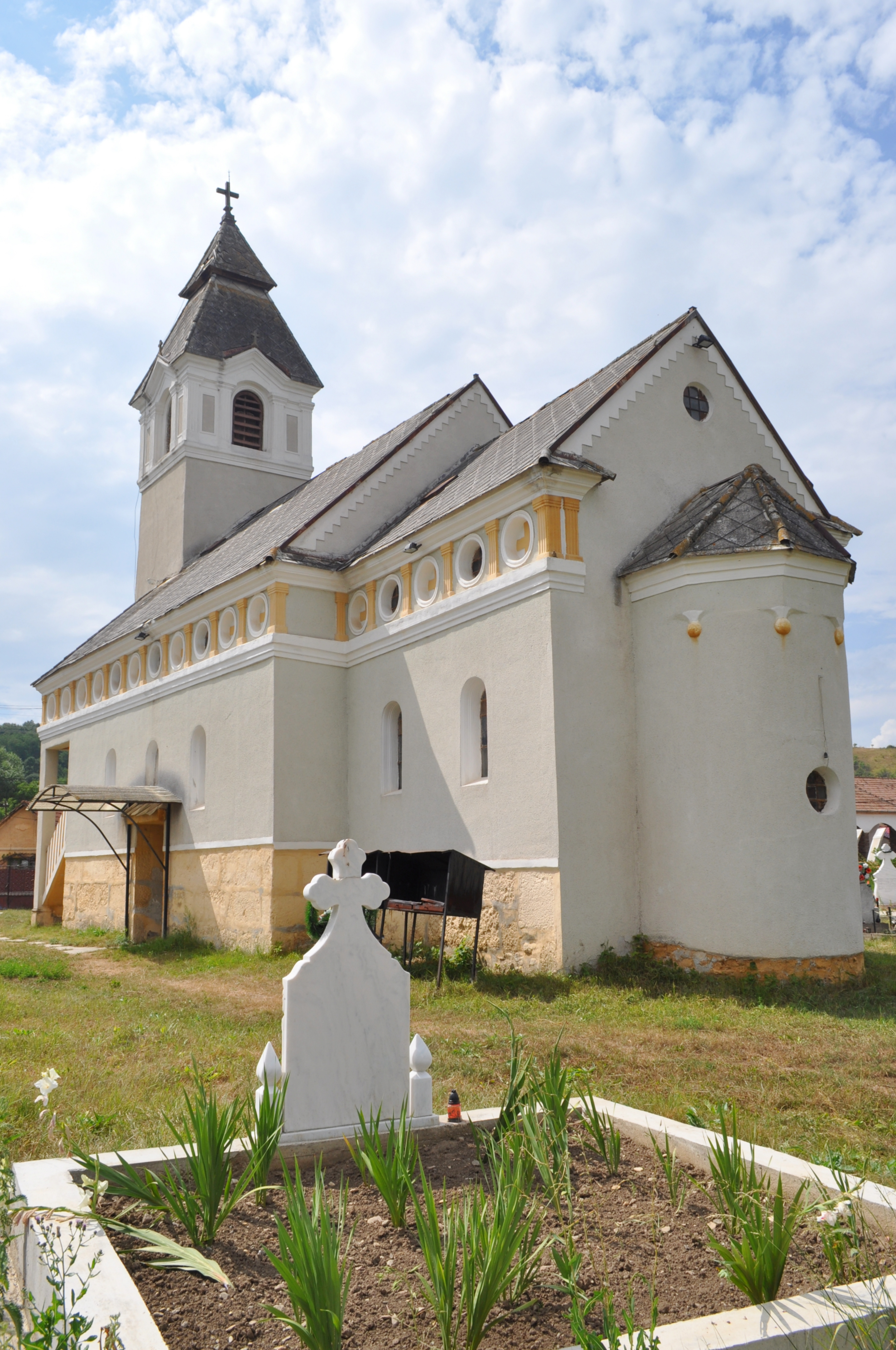 Biserica „Sfântul Prooroc Ilie”, sat Peșteana; comuna Densuș